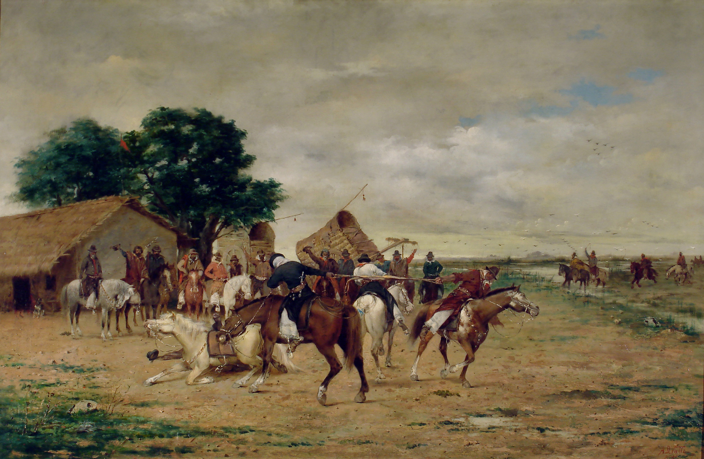 Ángel della Valle, El juego del pato. Siglo XIX. 95,4 x 146,4 cm, con marco: 108 x 158 cm, óleo sobre tela. Inv. 8493.